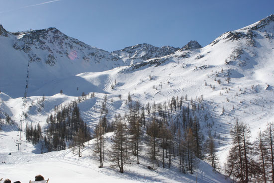 Serre-Chevalier : vue des sommets de l’Yret et de Cibouit (depuis le Bachas).